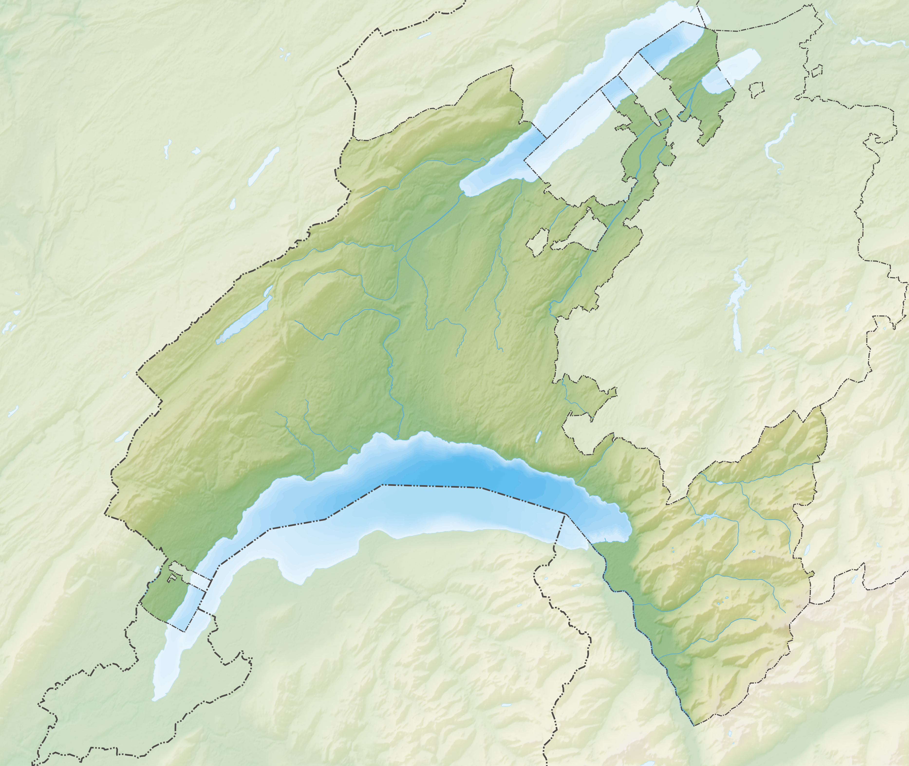 Reliefkarte des Kantons Waadt Topographischer Hintergrund: NASA Shuttle Radar Topography Mission (public domain). SRTM3 v.2.